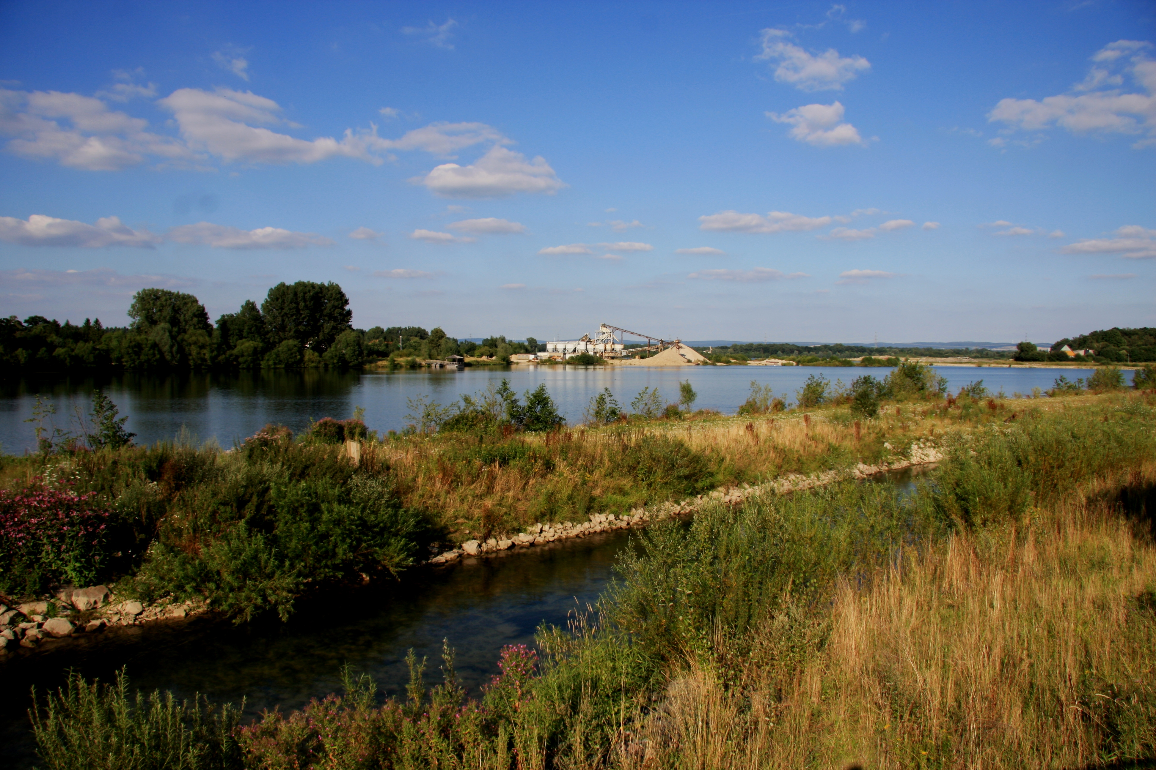 Lippessee in Sande bei Paderborn, NRW. Deutschland. Blick von Süden auf das Kieswerk.